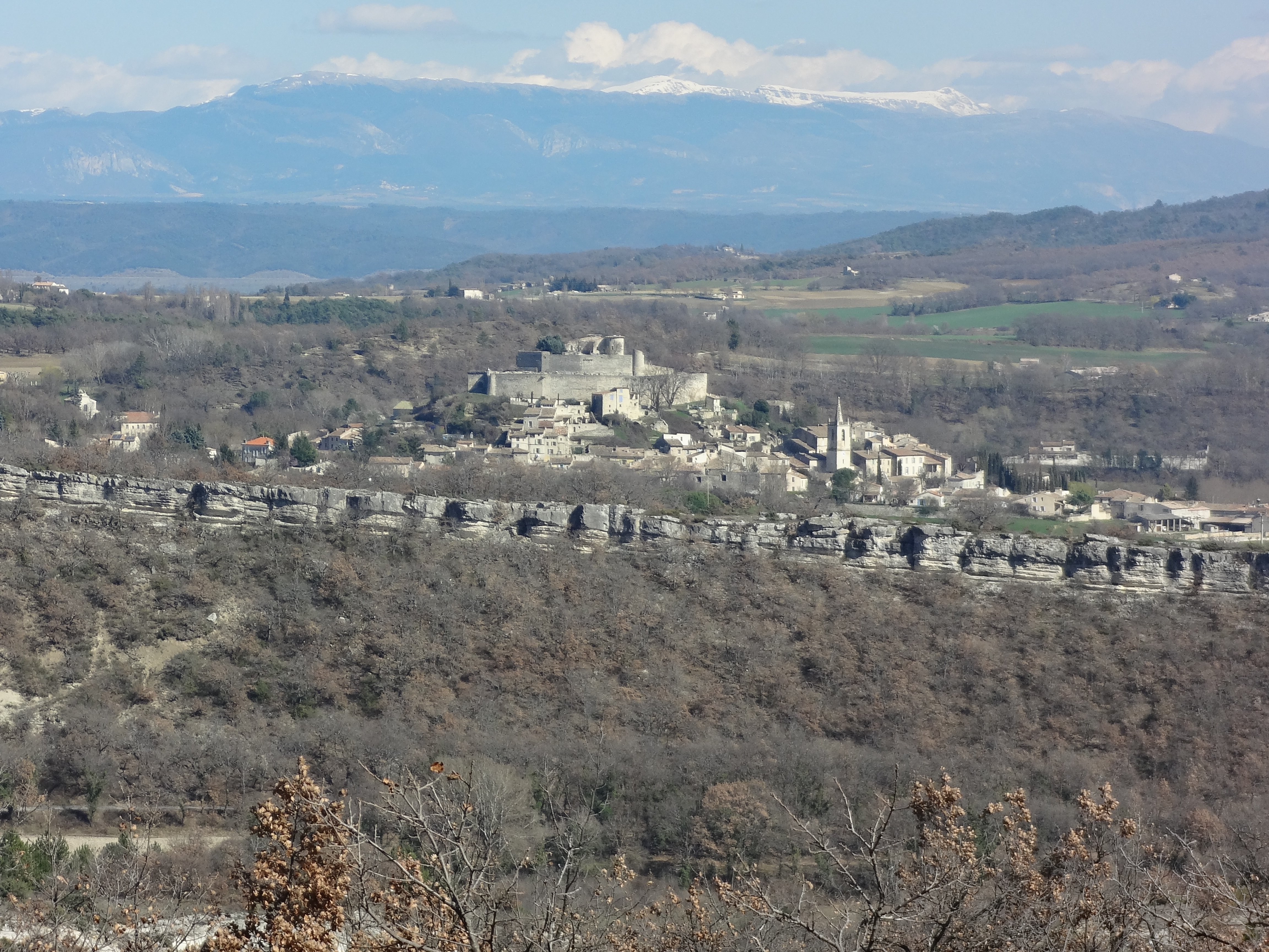 Vu de Mane, du chemin des Hautes-Plaines, avec la ribe (escarpement) de la vallée de la Laye